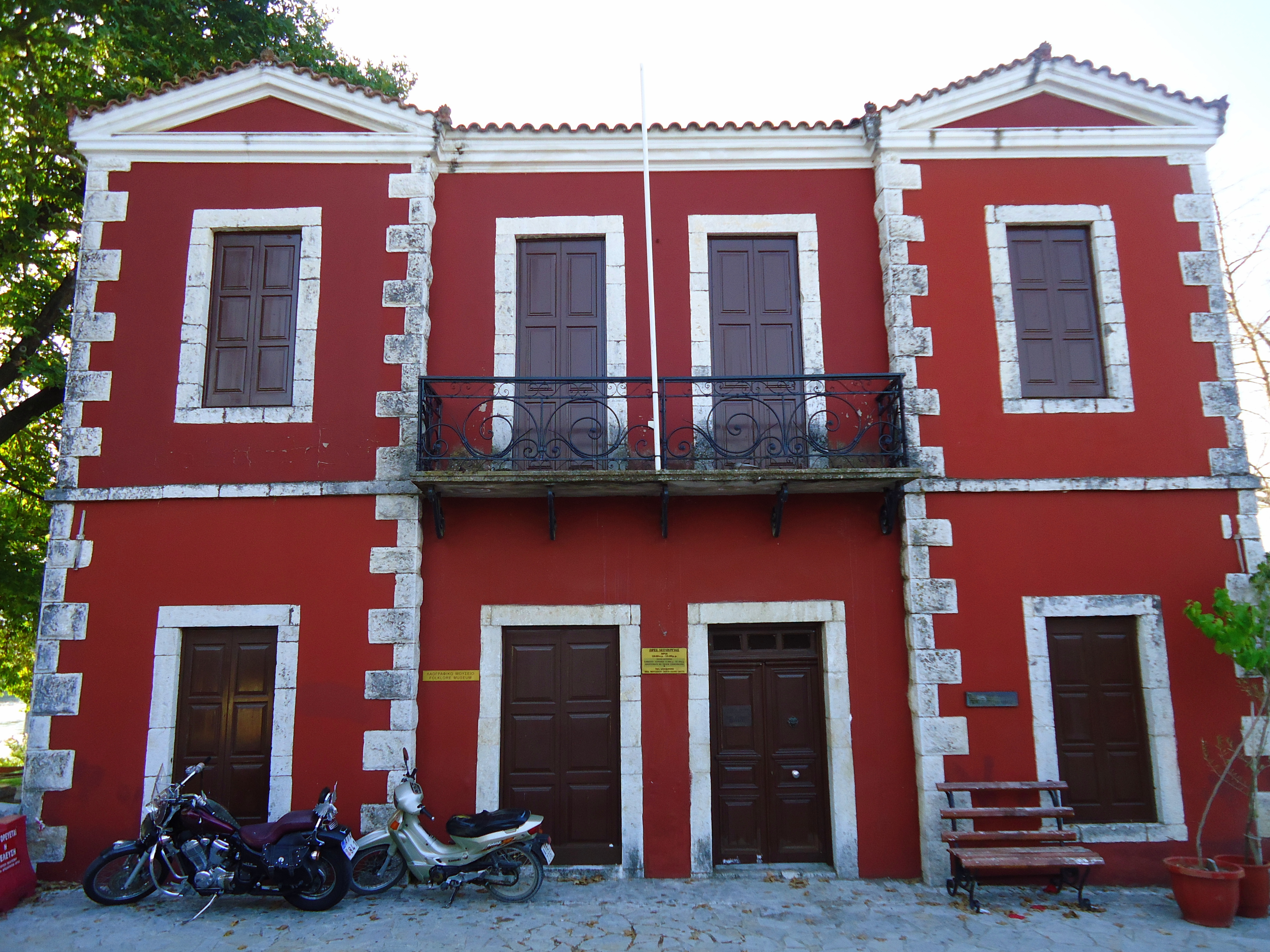 The Folklore Museum of Arta is located next to the most famous bridge of Greece. It was built in 1884 by an Austrian architect and it was used as an outpost of the bridge. After 1881 it was used as the border between the free and the occupied Greece (by the Turks).